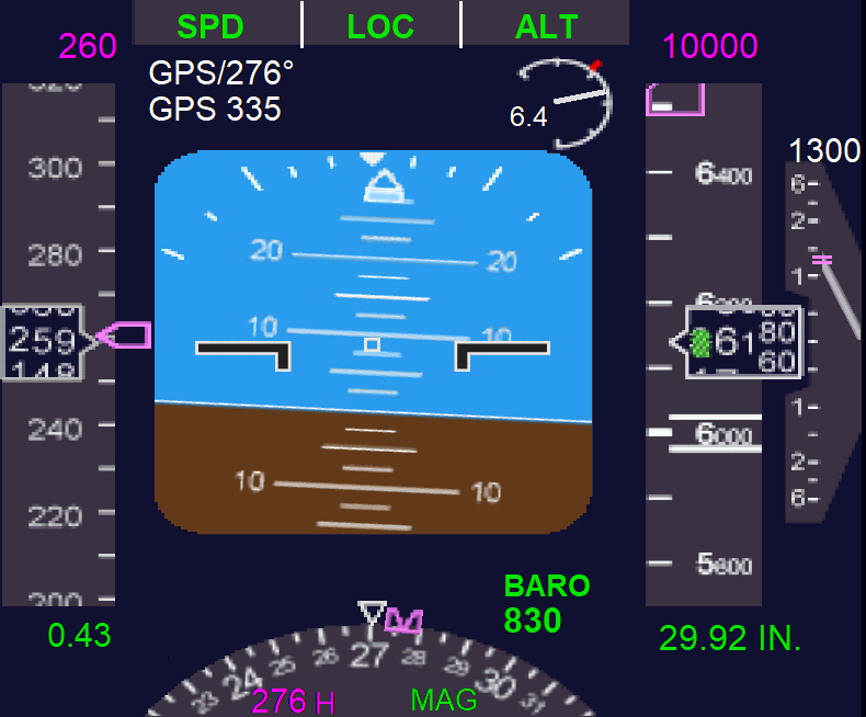 Künstlicher Horizont ohne Flight Director